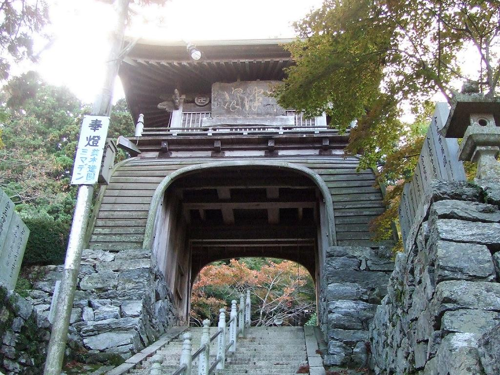 如意輪寺の山門